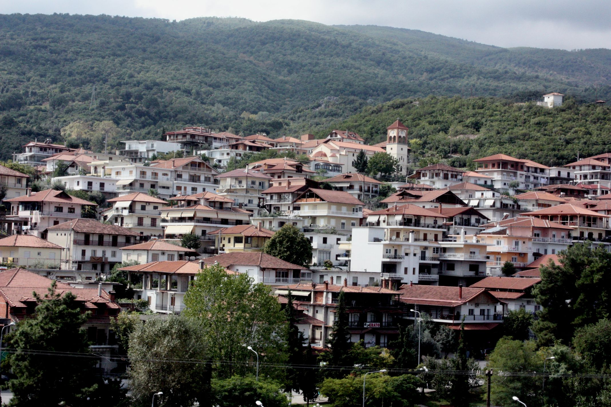 Neos Panteleimonas